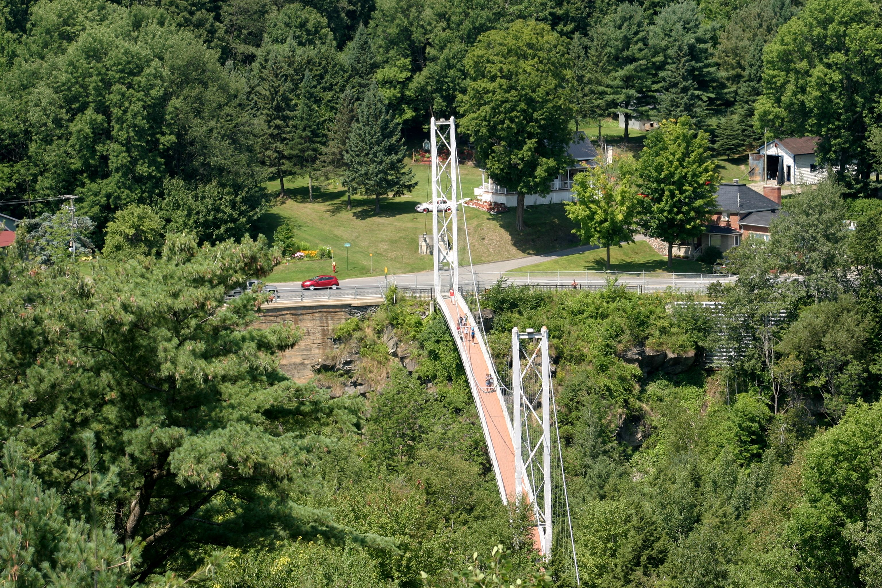 Point suspendu vu du haut de la tour, ponts sur la rivière Coaticook